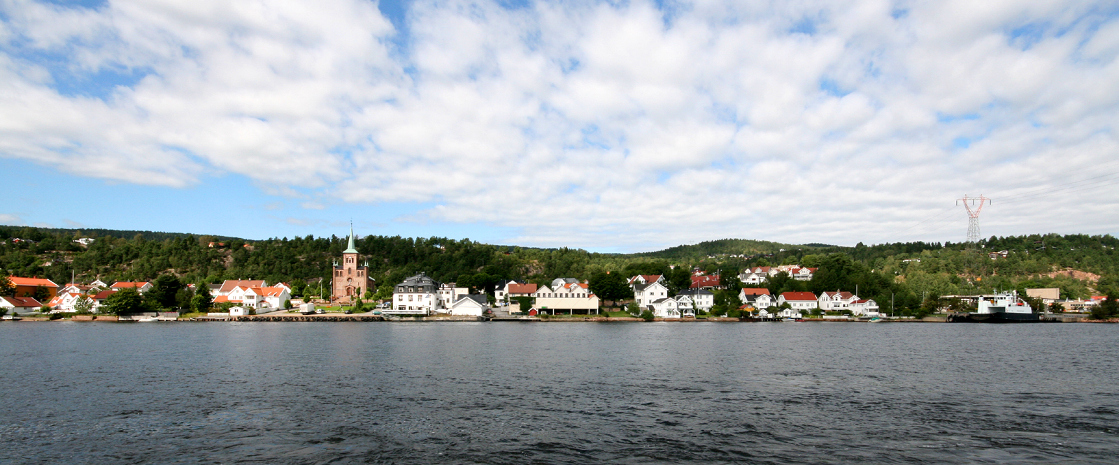 Svelvik, Vestfold, Norway.